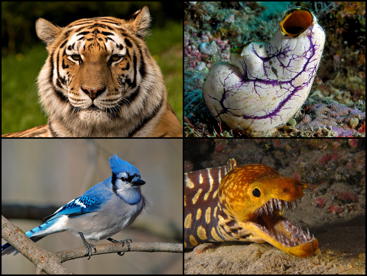 Chordés de différentes classes.